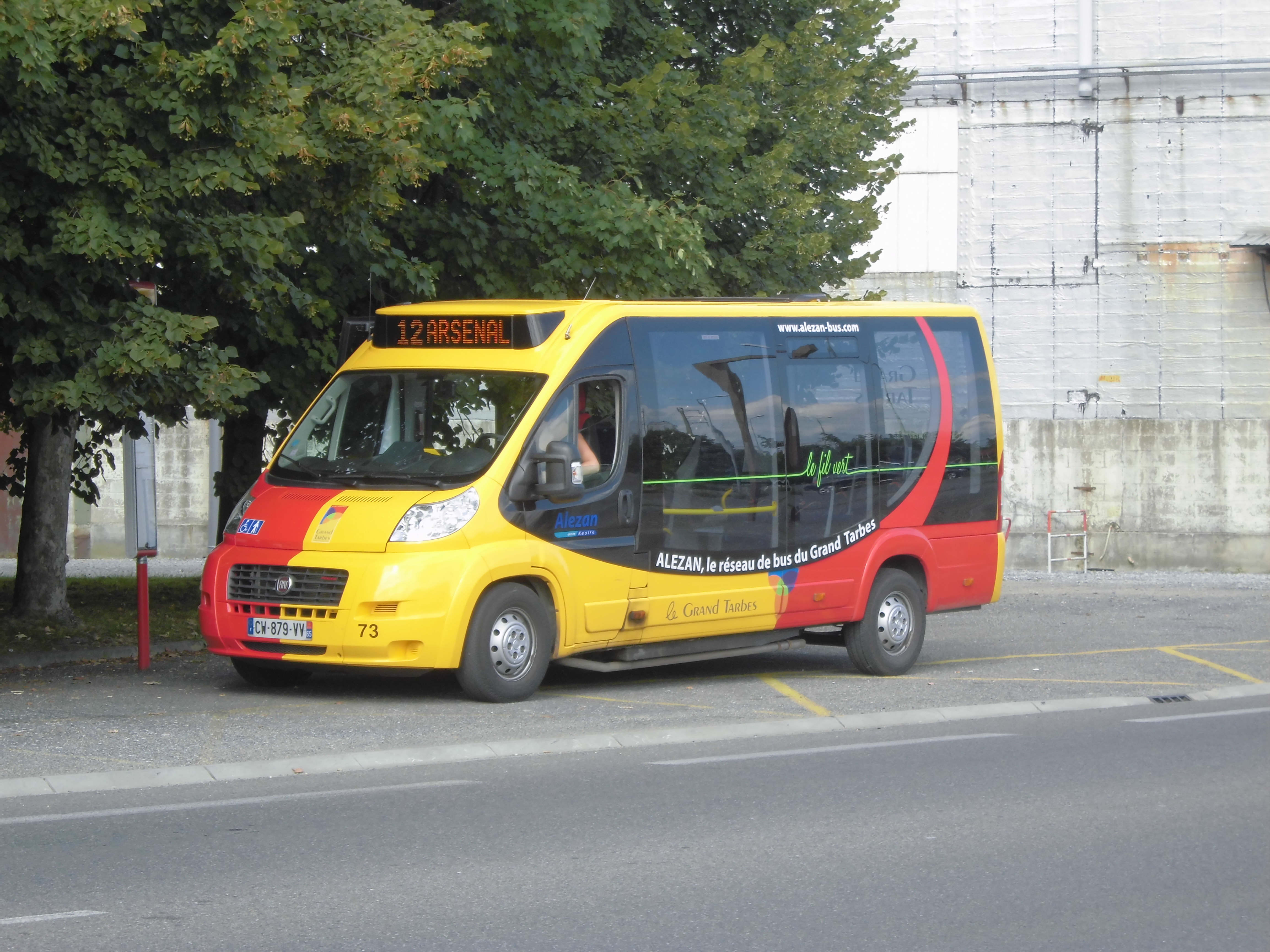 Bus sur le réseau Alezan de Tarbes sur la ligne 12 à l'arrêt Cinémas.